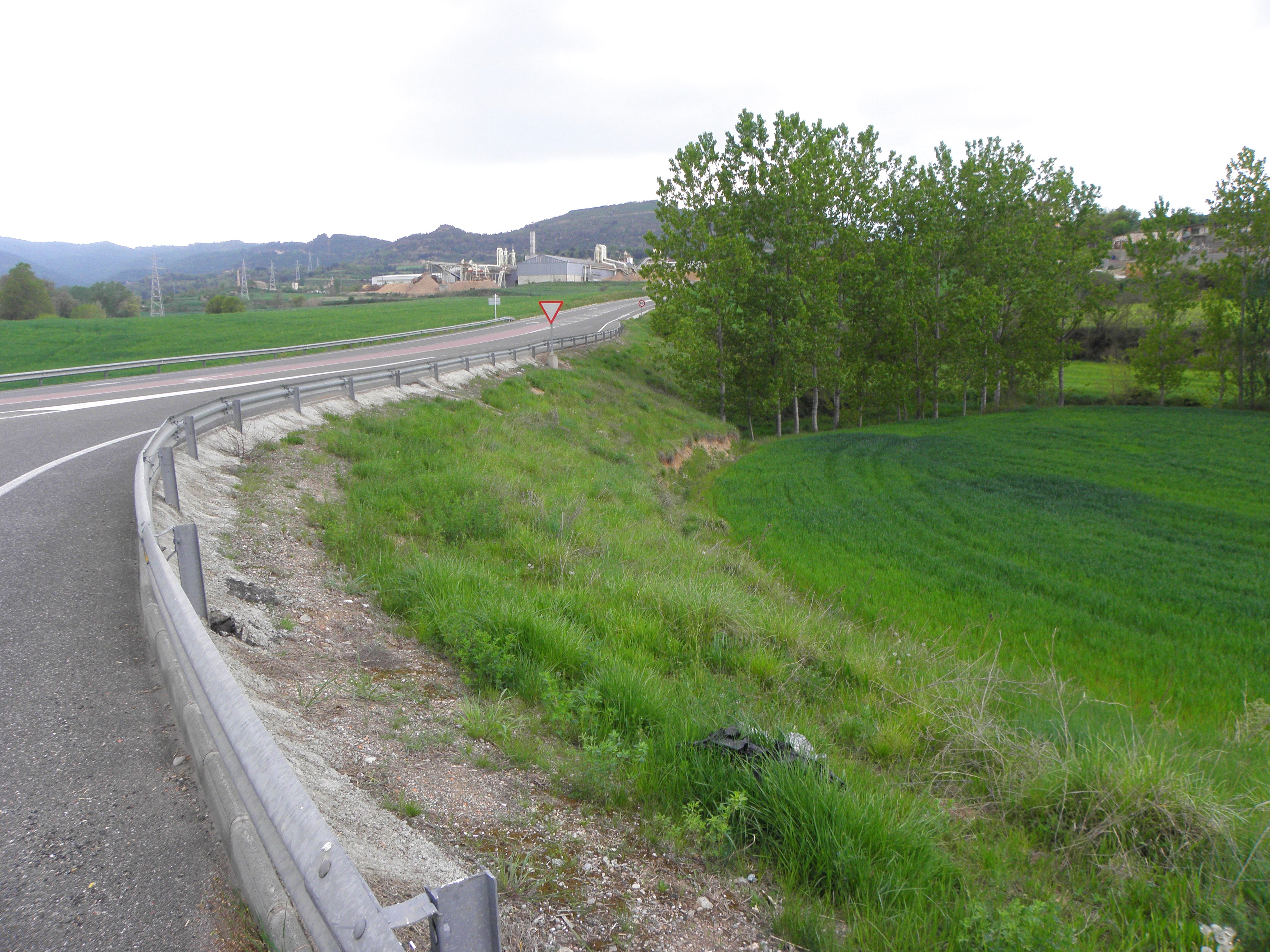 El barranc de Ribalta just després de travessar la carretera C-451 a Solsona (Solsonès). Al fons, la fàbrica de Tradema